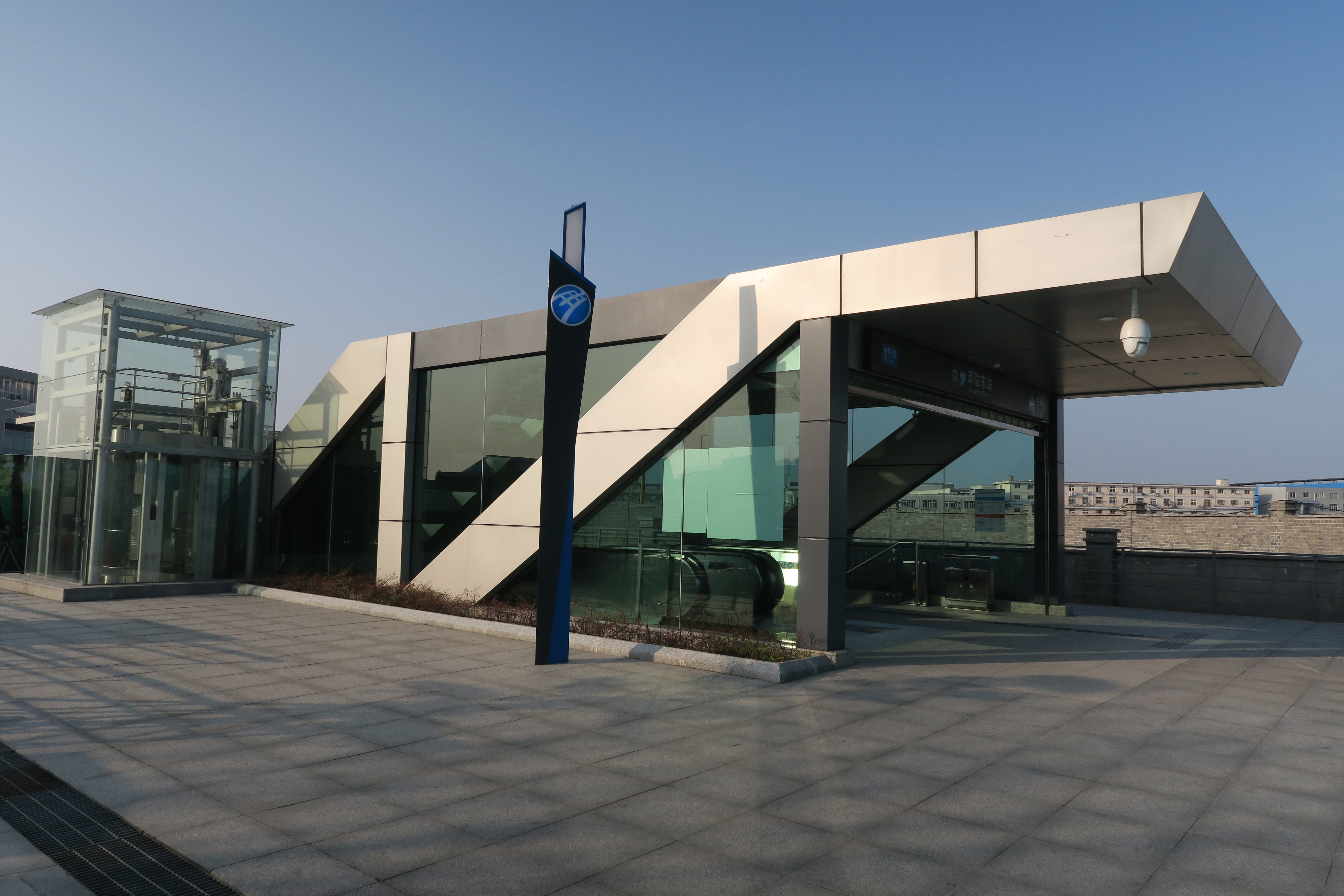 宁波轨道交通邱隘东站